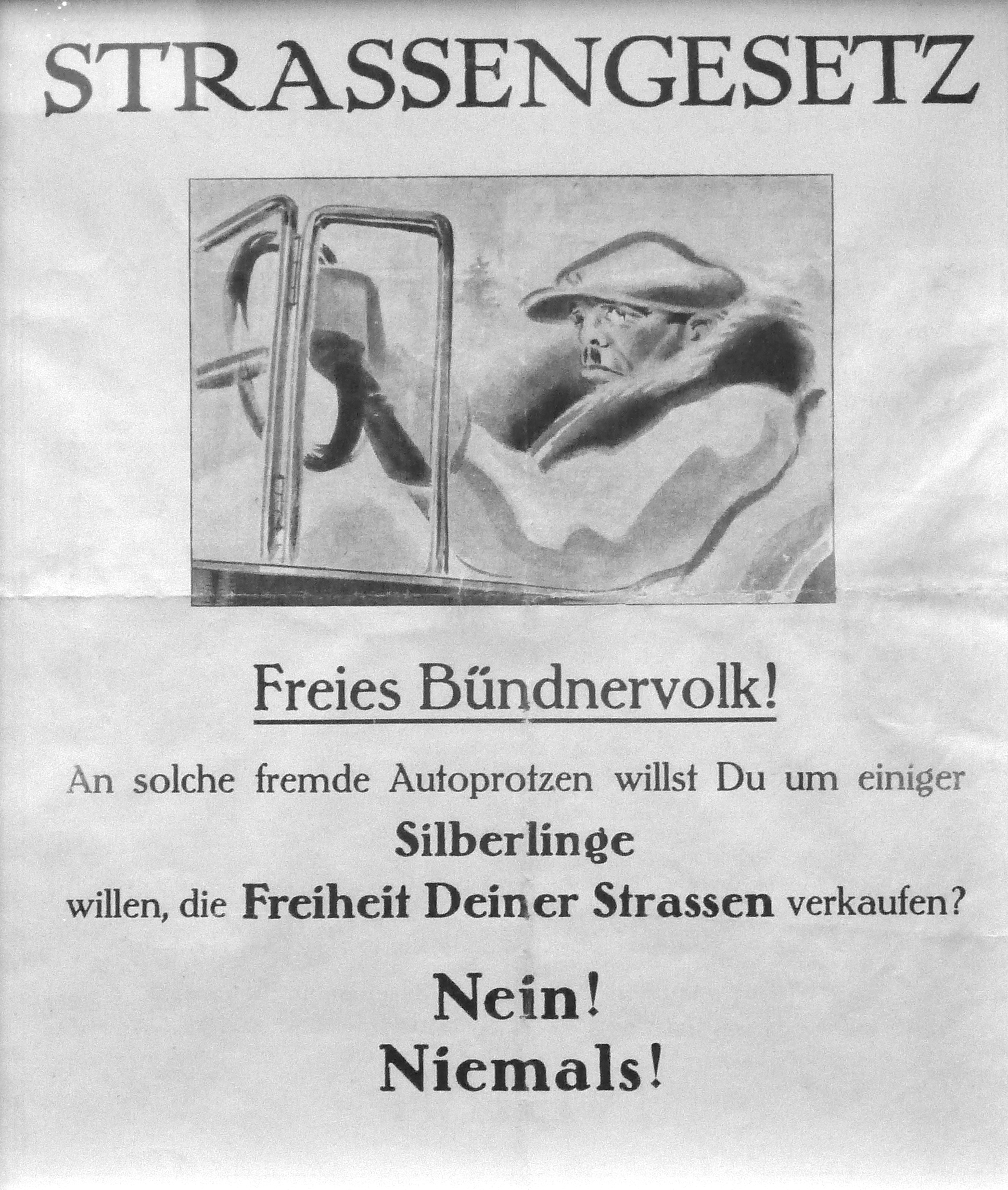 Propagandaschrift zur Abstimmung über das kantonale Strassenverkehrsgesetz vom 20. Februar 1927 im Kanton Graubünden